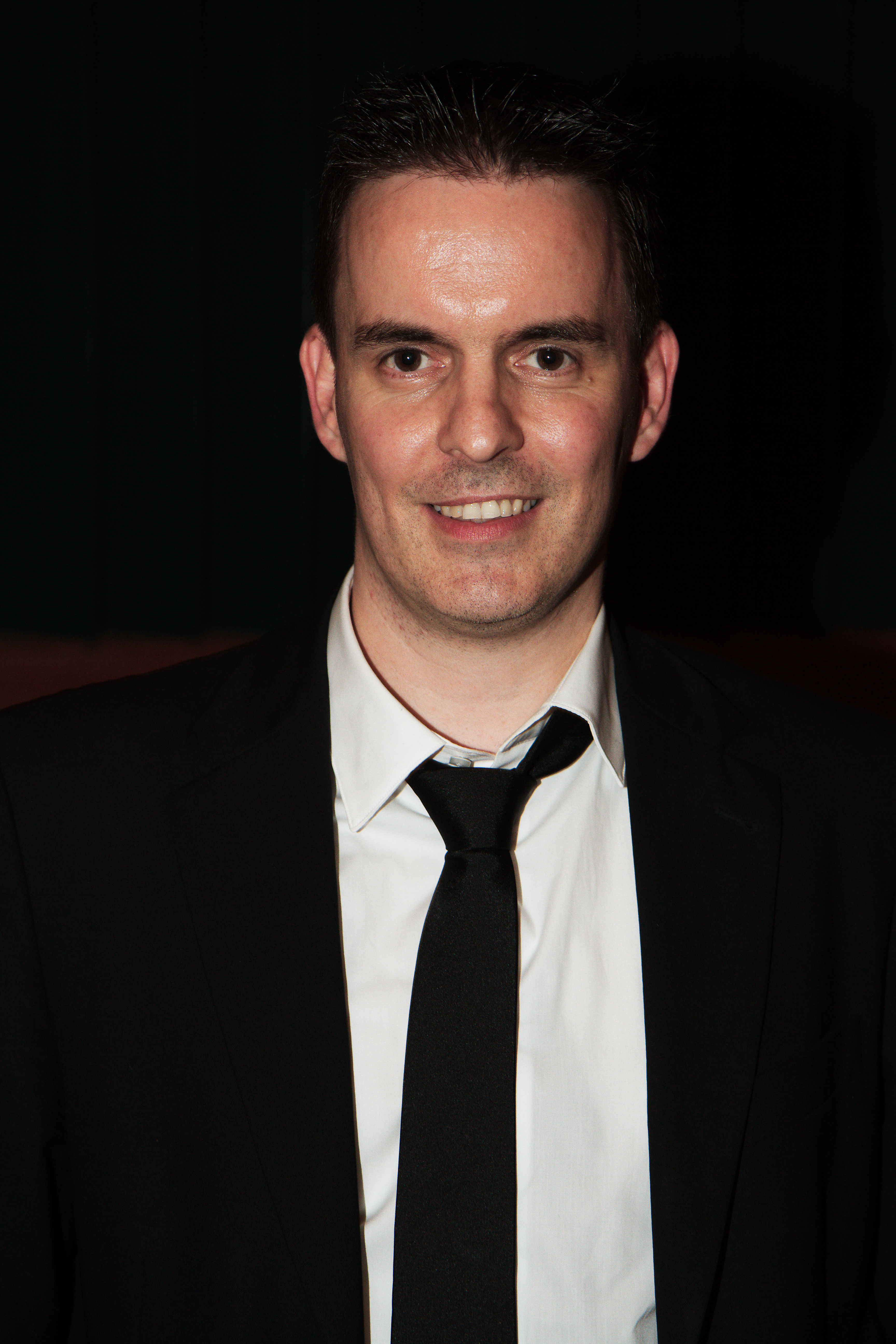 Aufnahme der 100. Folge Fernsehkritik.TV Ort: Babylon Kino Berlin